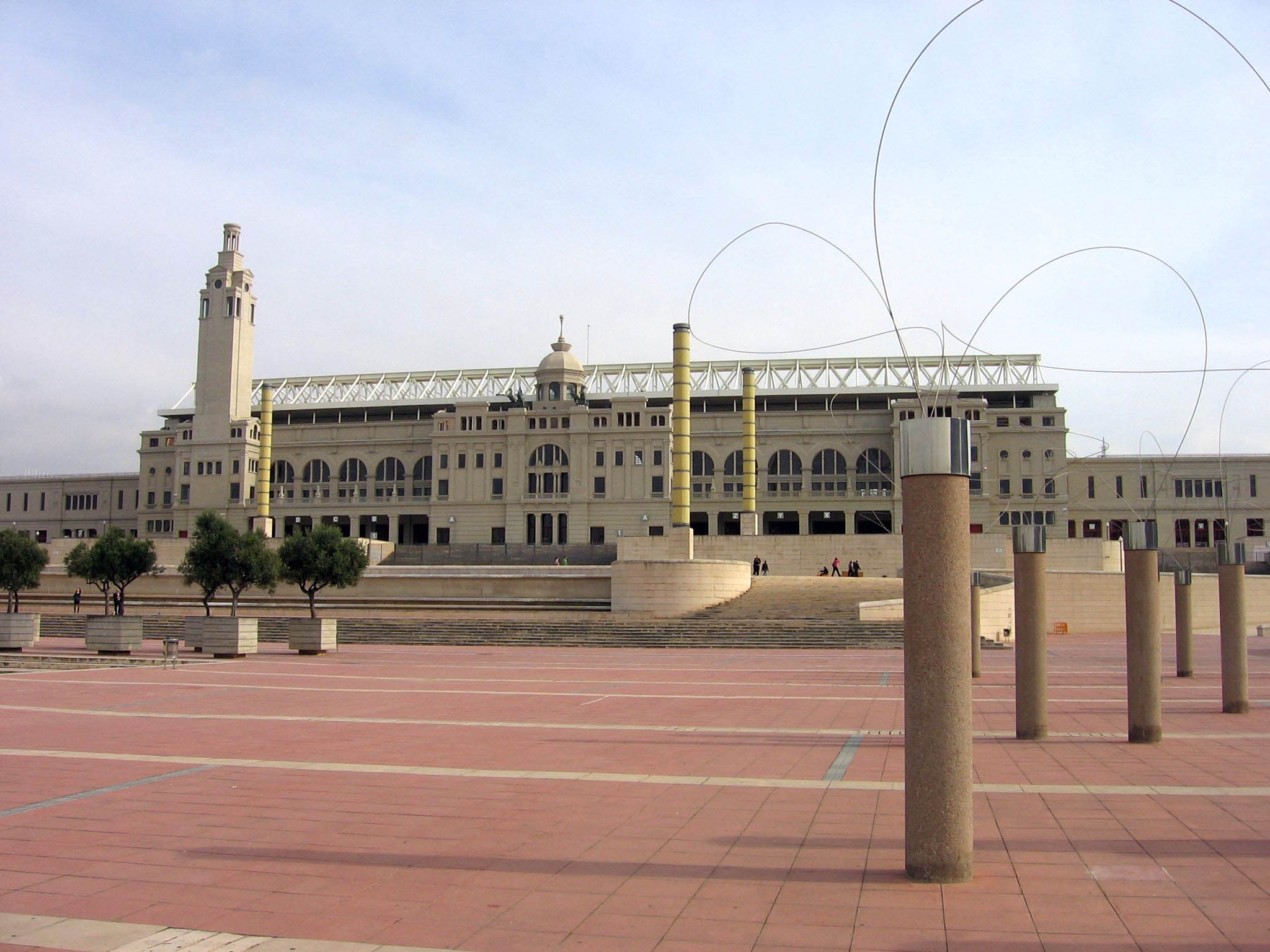 Estadio Olímpico Lluís Companys, Montjuïc (Barcelona)